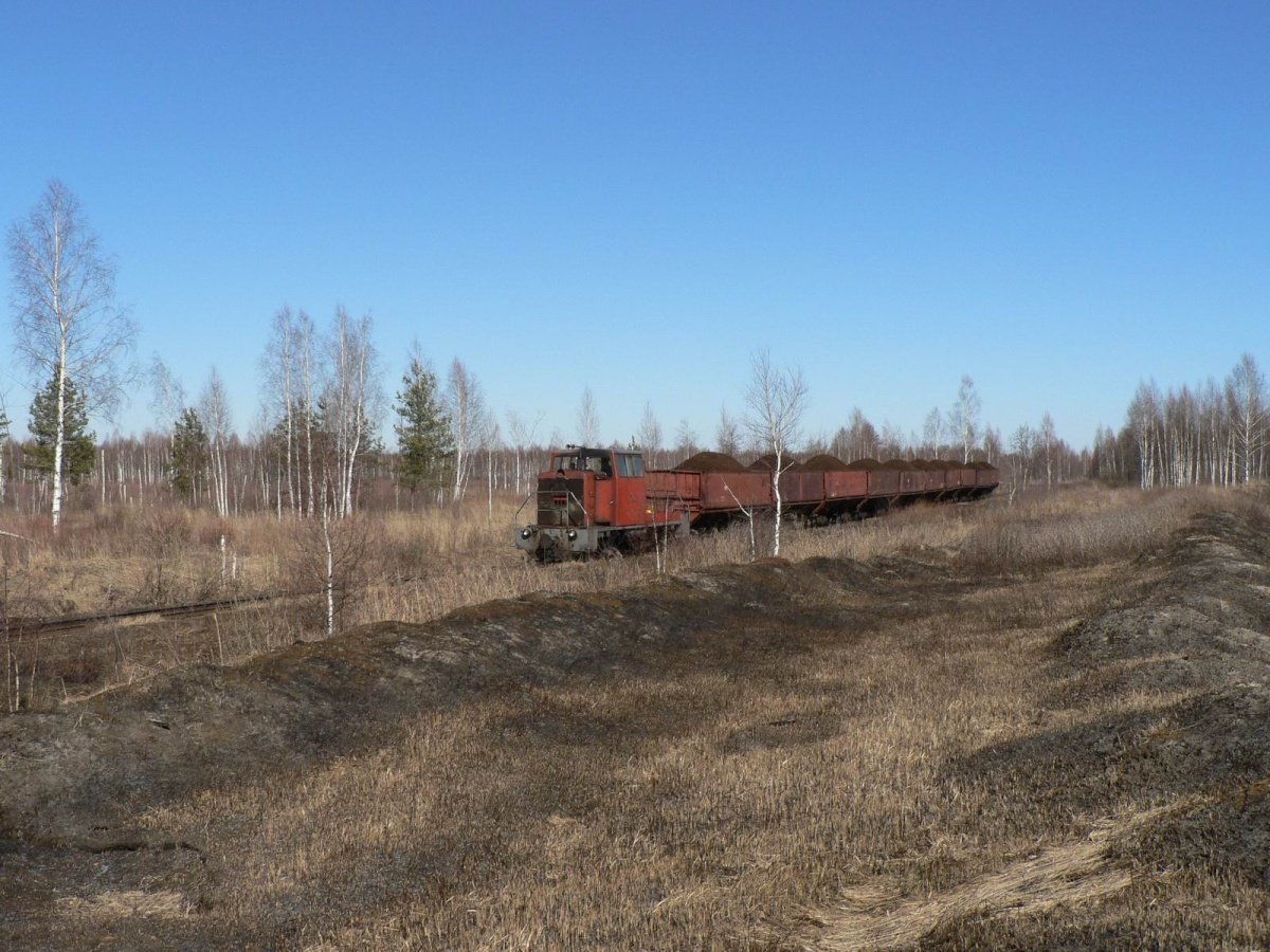 ТУ6Д-0202 с грузовым поездом прибывает в поселок, УЖД Мезиновского т/пр